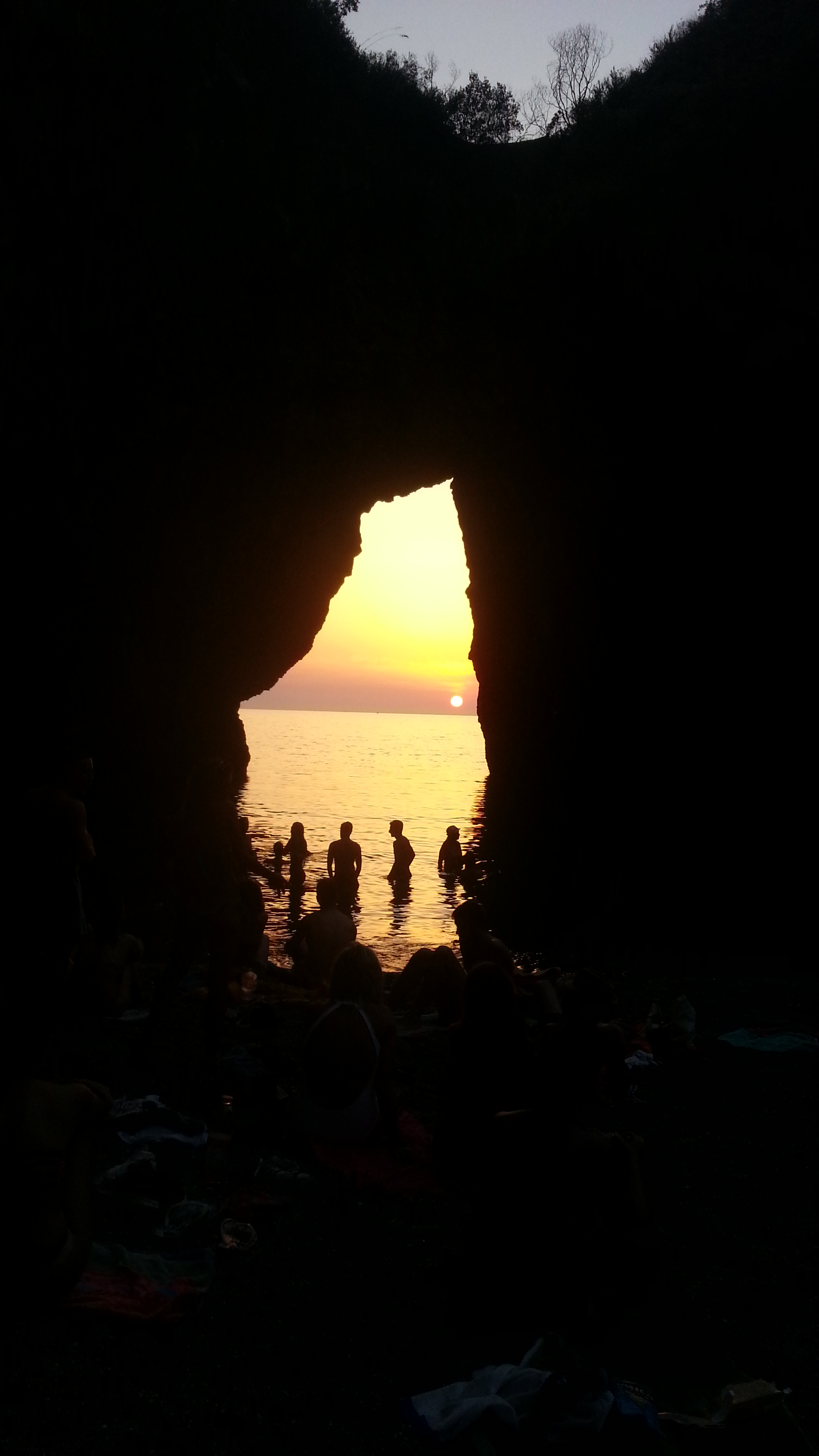 Foto creata col cellulare personale